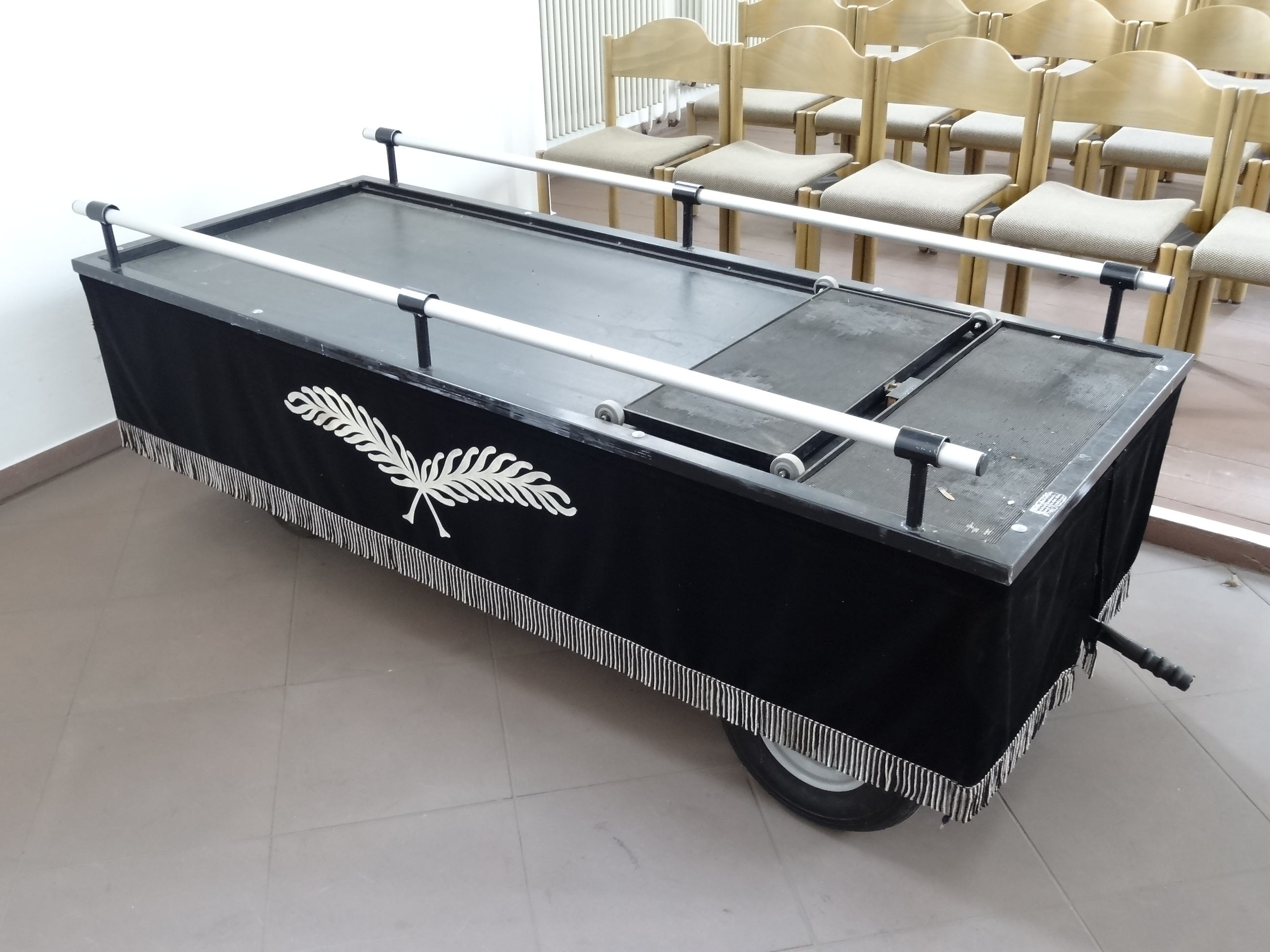 Friedhofskapelle Butzbach, coffin cart